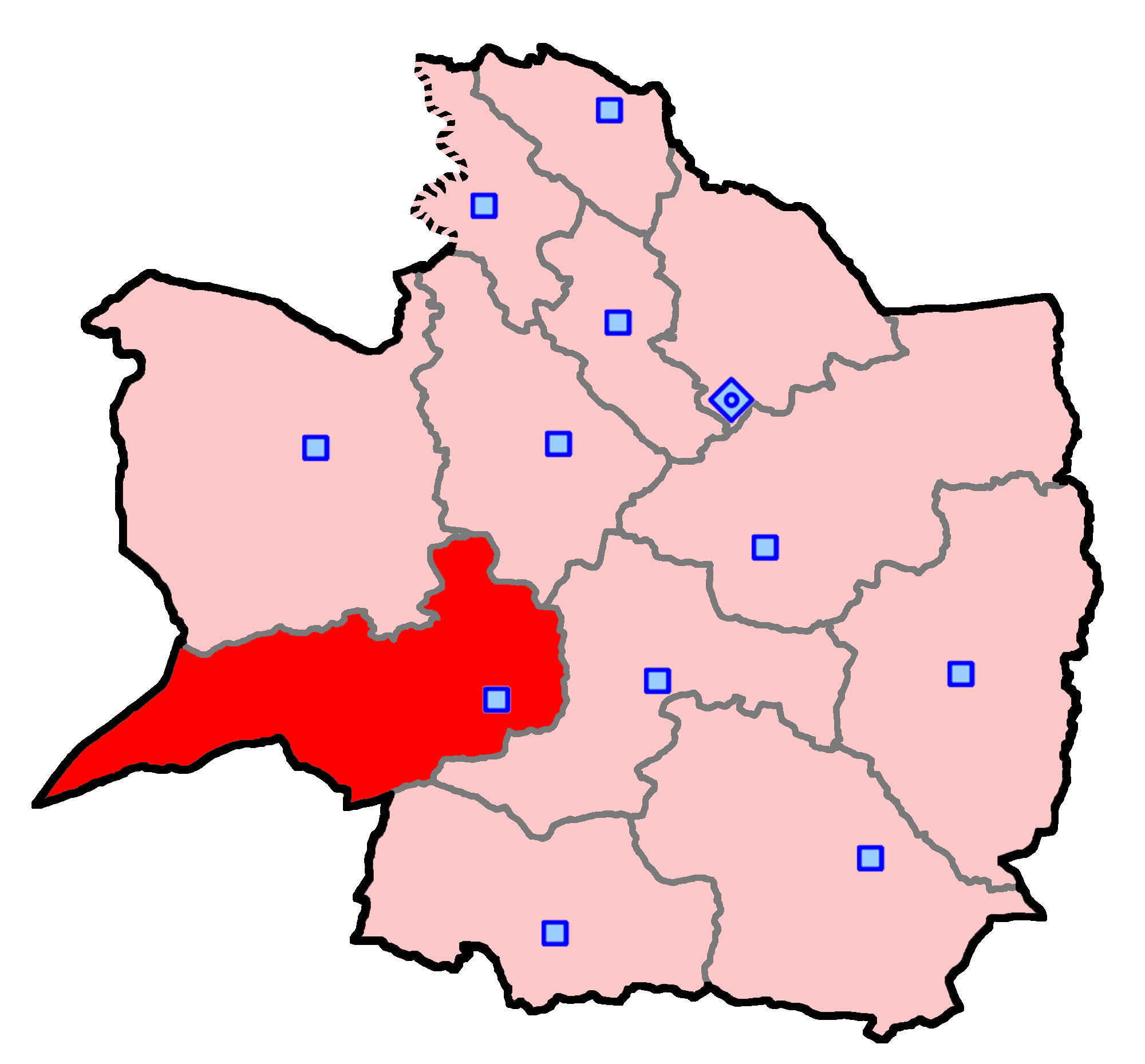 حوزهٔ انتخاباتی کاشمر، بردسکن و خلیل آباد برای انتخابات مجلس شورای اسلامی